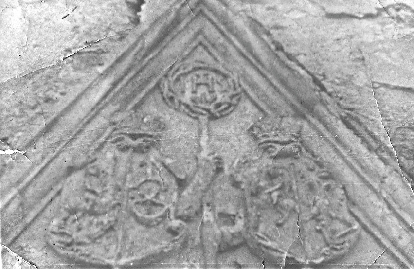 Барельєф, що знаходився на південному фасаді Заславської катедри із зображенням гербів фундаторів Януша Янушевича Заславського і Олександри Романівни Санґушківни.